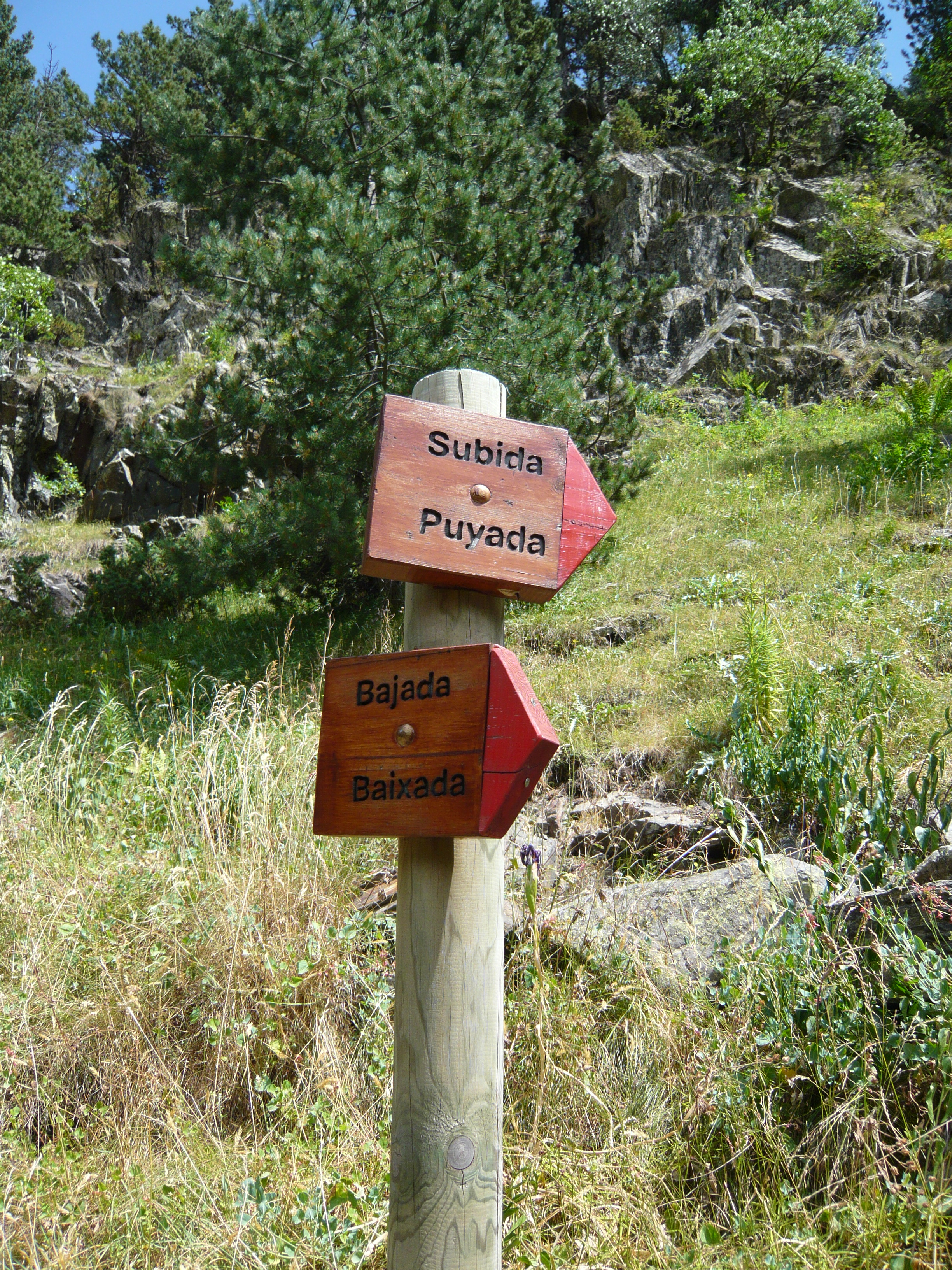 Aragonés: Siñals bilingües aragonés benasqués/castellán